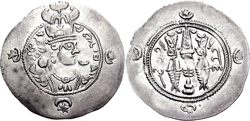 Coin of Yazdgard iii, Sasanian king (632-651)